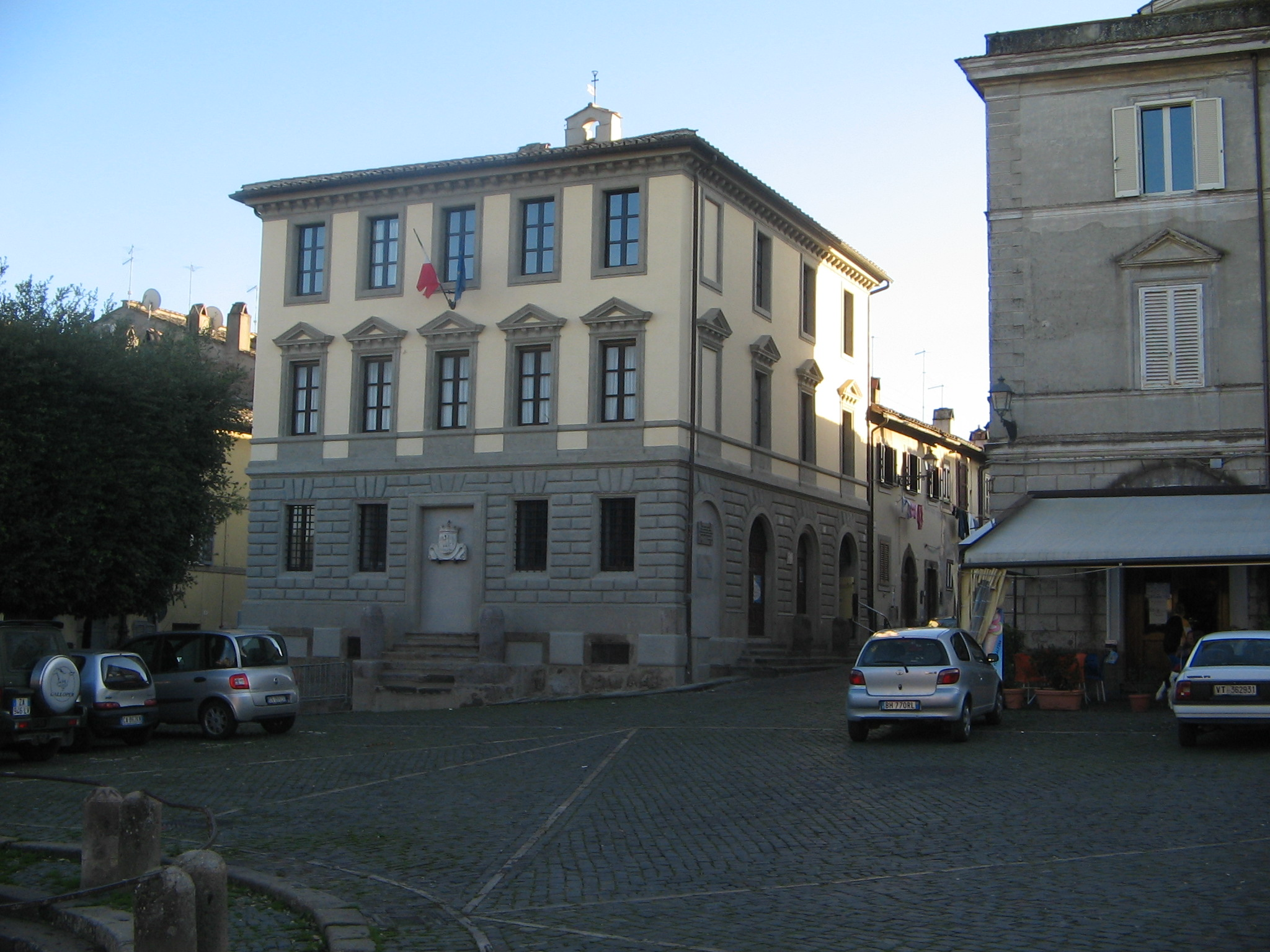 Municipio di Oriolo Romano (Italia - Lazio